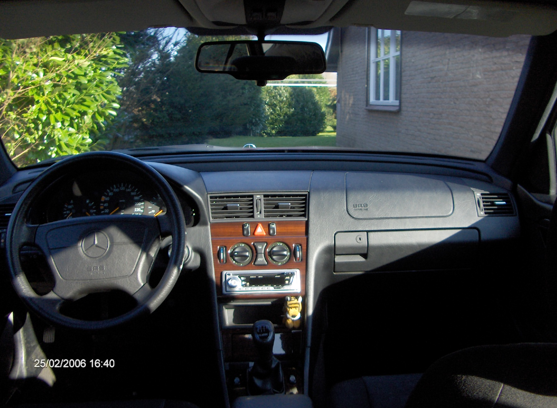 foto van het interieur van c klasse w202. Zelf gemaakt.